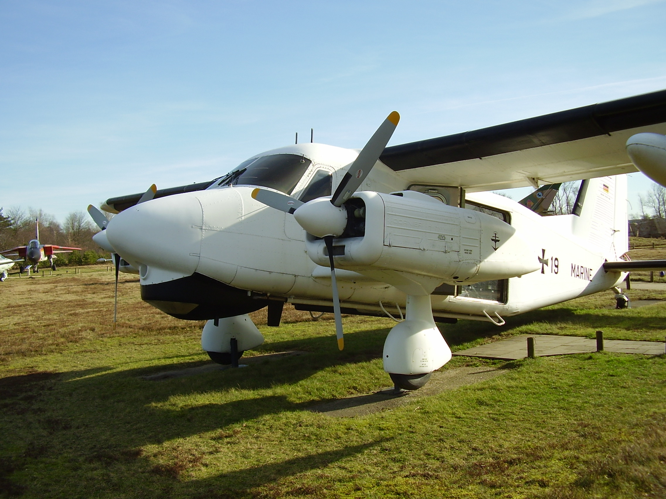 Aeronauticum in Nordholz, Luftschiffe, Zeppelin, bei Cuxhaven, Luftfahrtmuseum